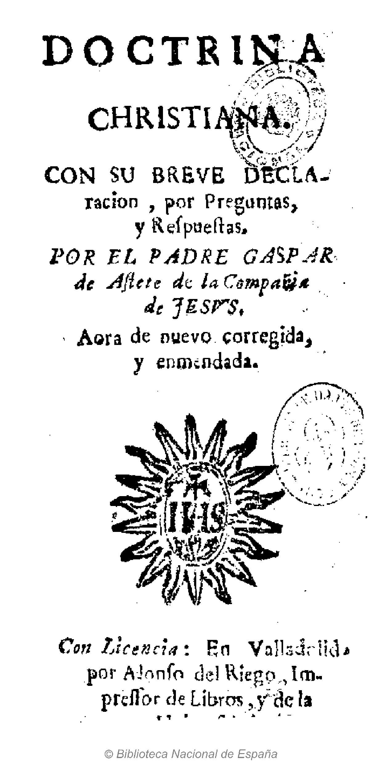 Doctrina christiana : con su breve declaracion por preguntas y respuestas por el Padre Gaspar de Astete de la Compañia de Jesus Autor: Astete, Gaspar (1537-1601) Fecha: 1700 Datos de edición: En Valladolid por Alonso del Riego